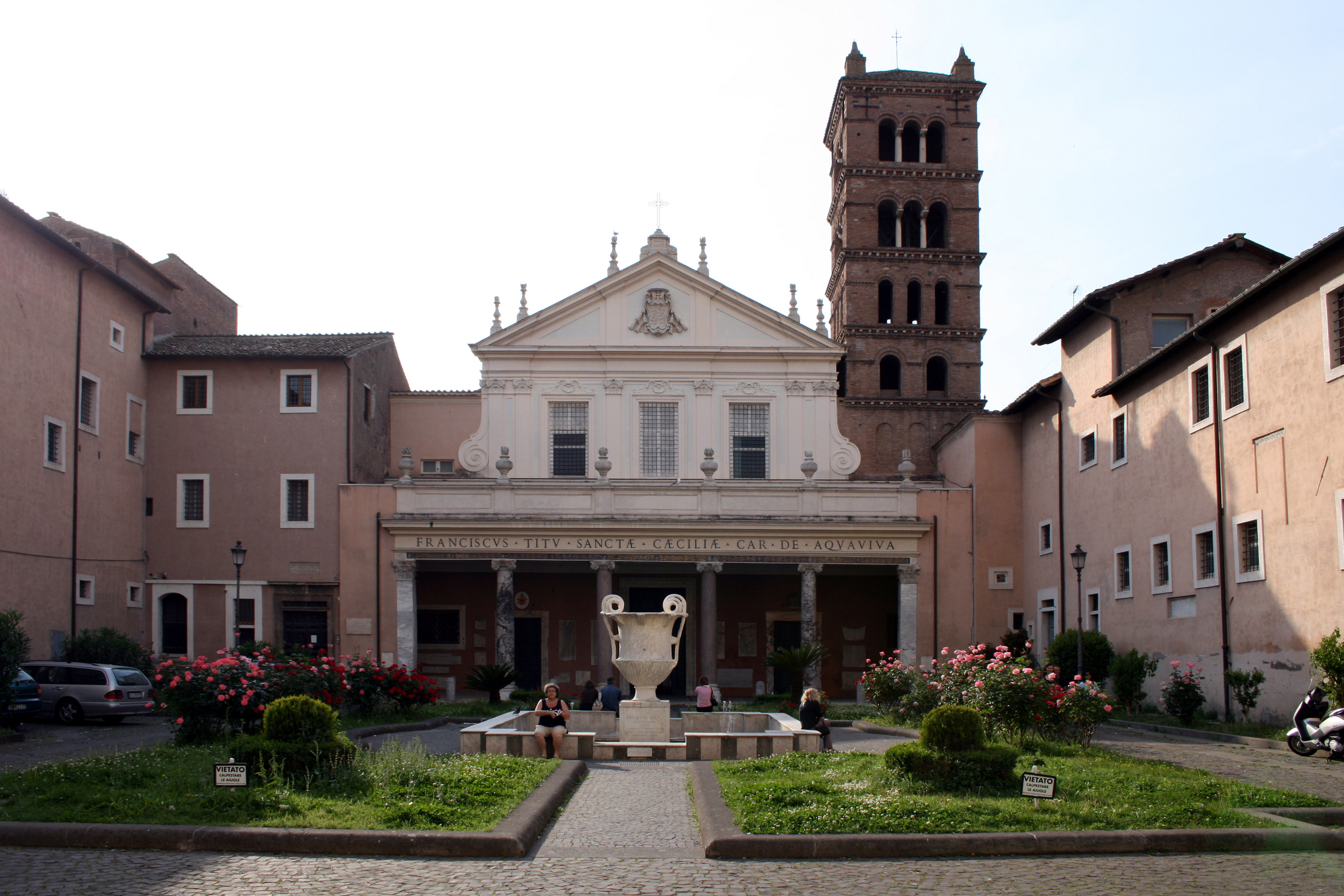 Eglise Santa Ceciclia Travesere à Rome